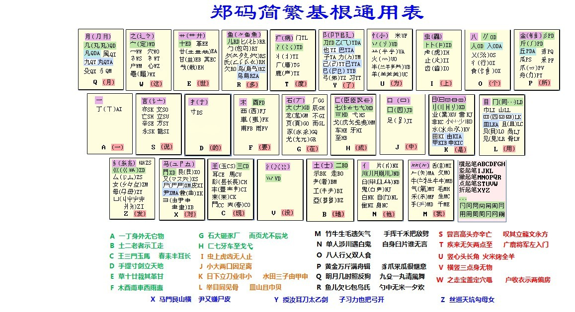 郑码输入法字根表